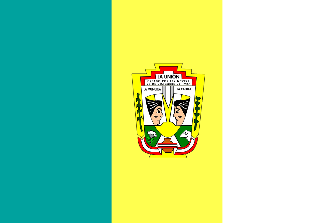 Bandera La Unión